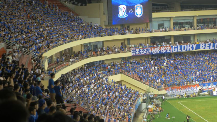 Болельщики Шанхай Шеньхуа